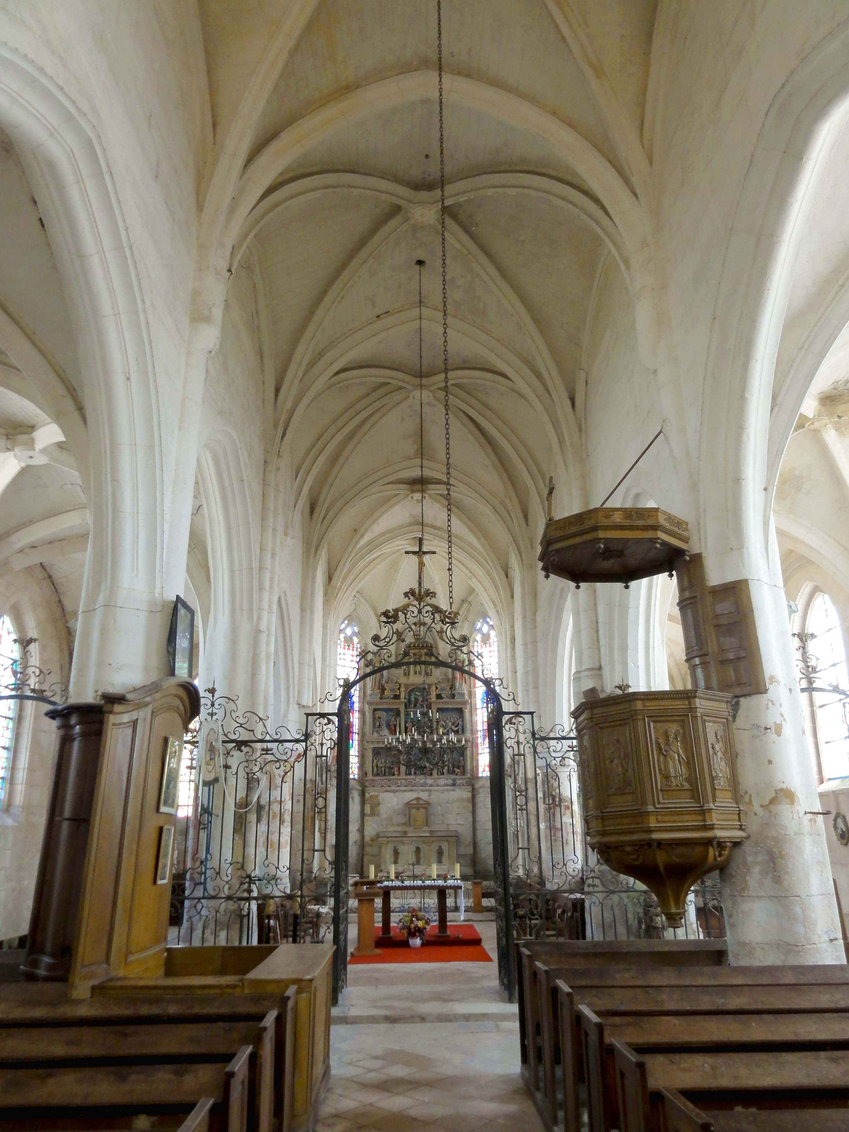 Intérieur de l'église (voir titre).